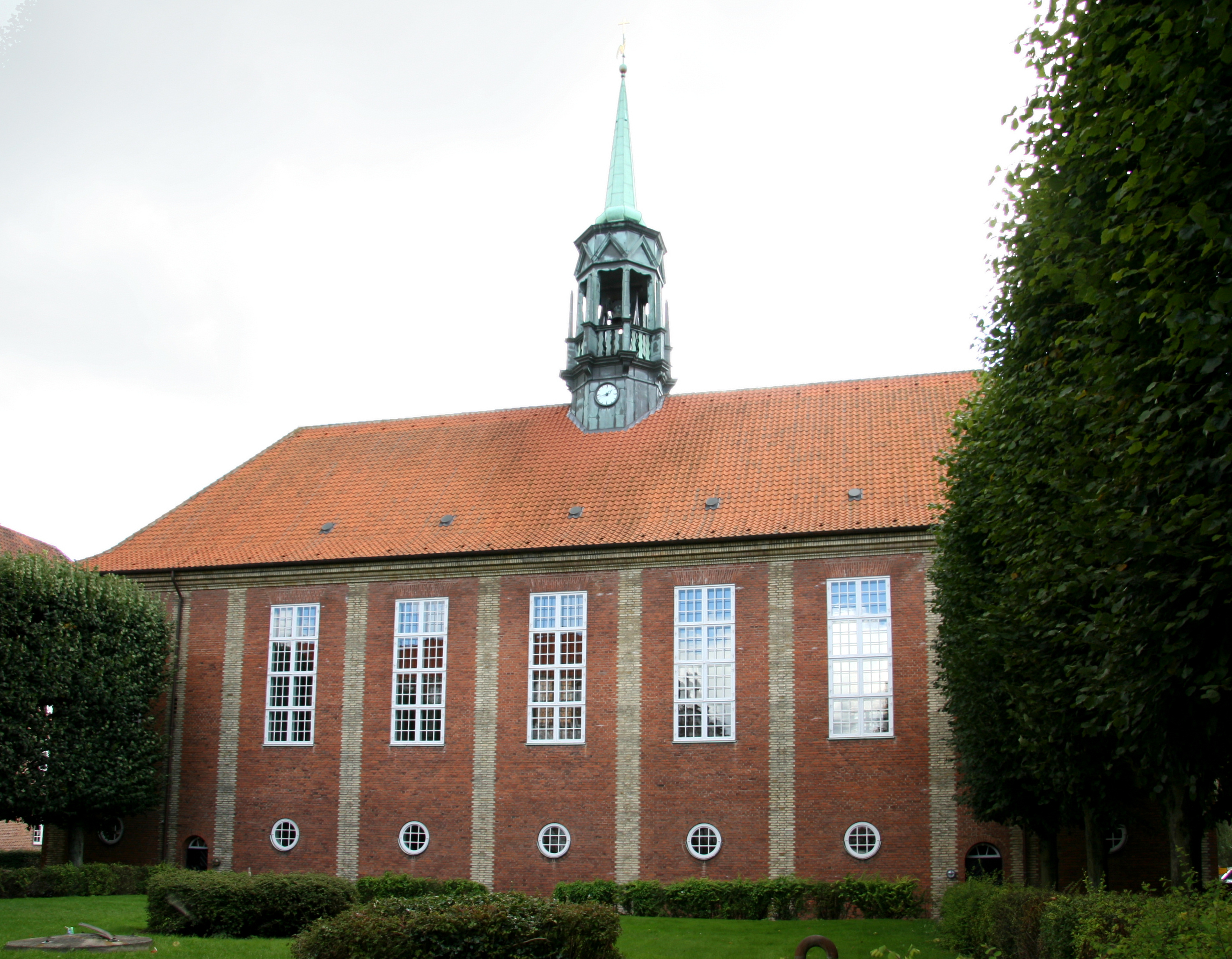 Lindevang Kirke in Copenhagen, Denmark.